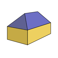 Walmdach. Im Gegensatz zum Satteldach hat ein Walmdach nicht nur auf der Traufseite, sondern auch auf der Giebelseite (das ist die kurze Seite des Hauses) geneigte Dachflächen. Sie werden als Walm bezeichnet.